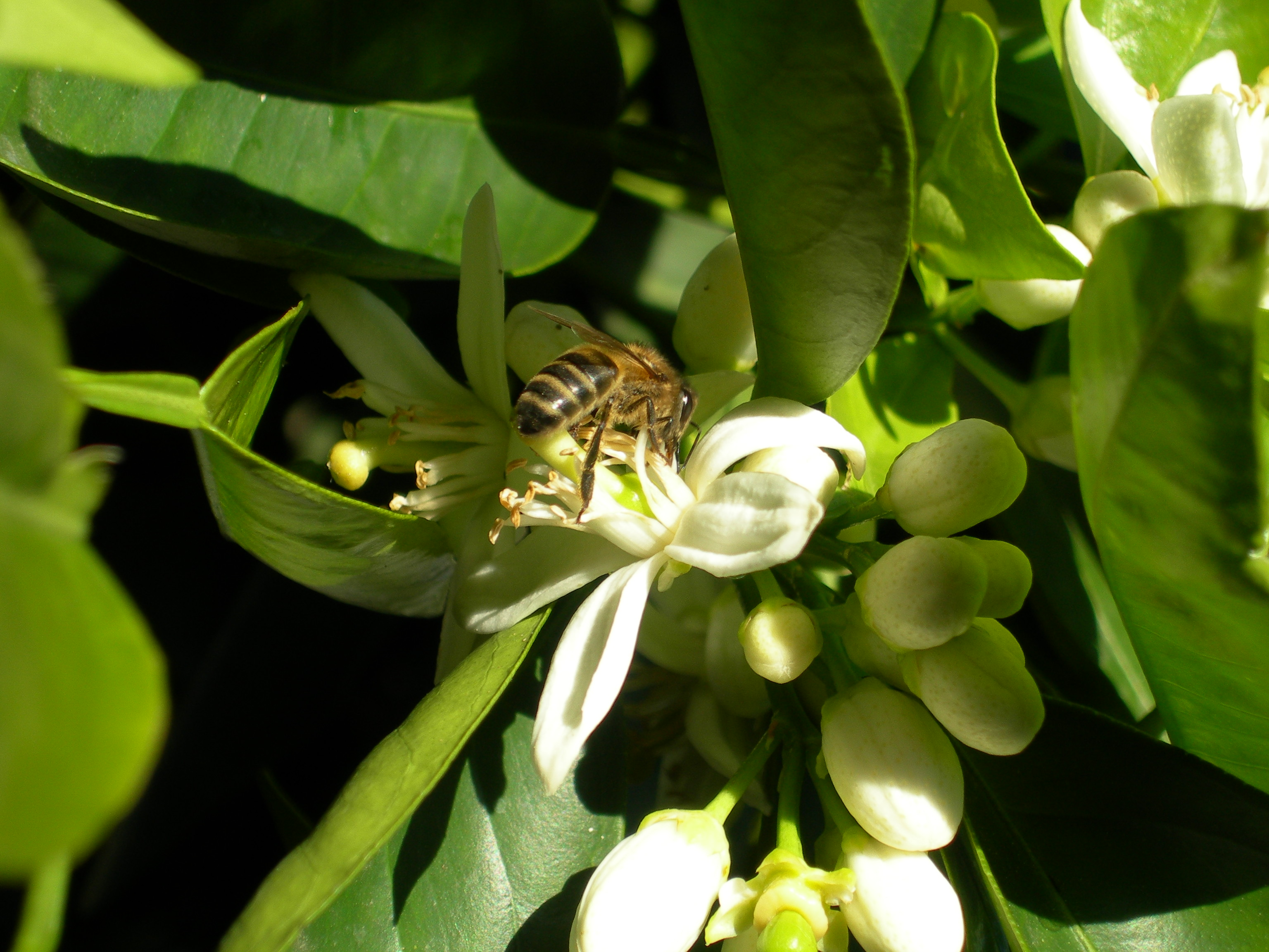 Sierra de Gata This is a photography of a Site of Community Importance in Spain with the ID: ES4320037. Natura2000 entry, EEA entry